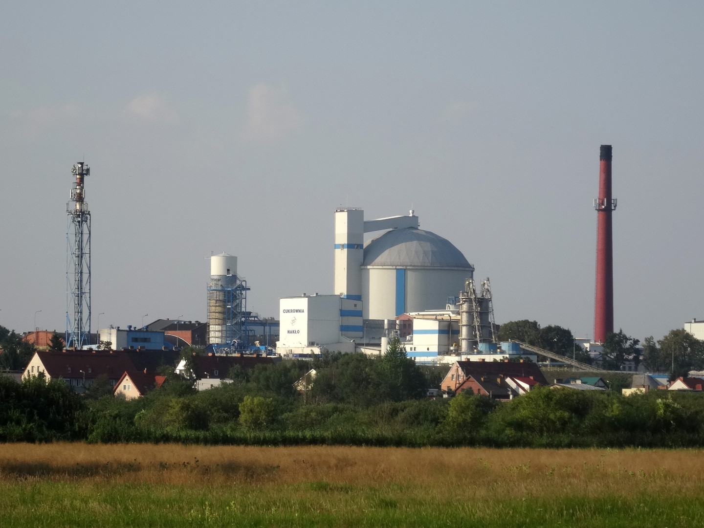 Widok miasta Nakła nad Notecią znad przystani